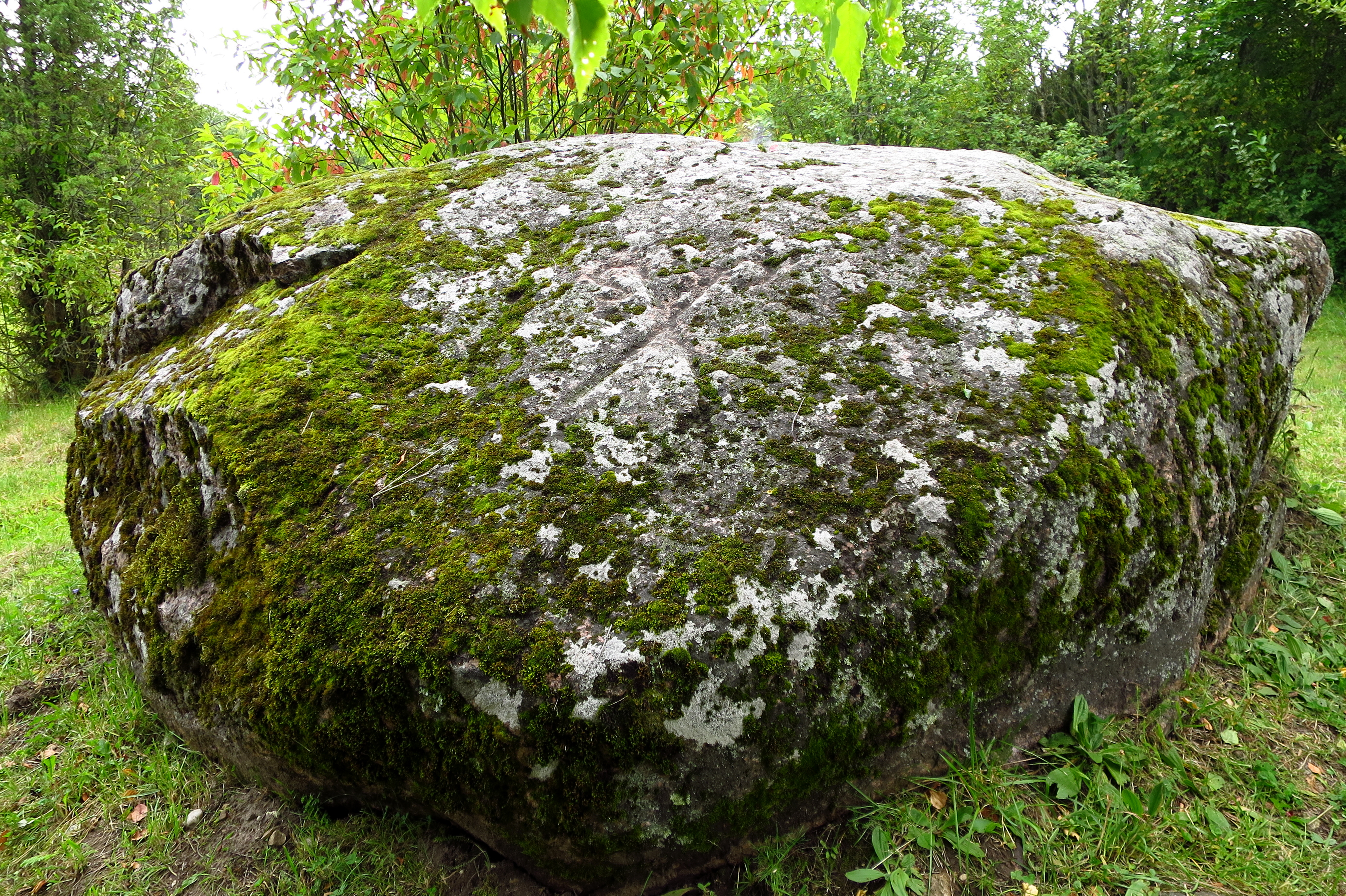 Lauritsakivi